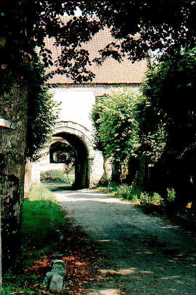 Tincques